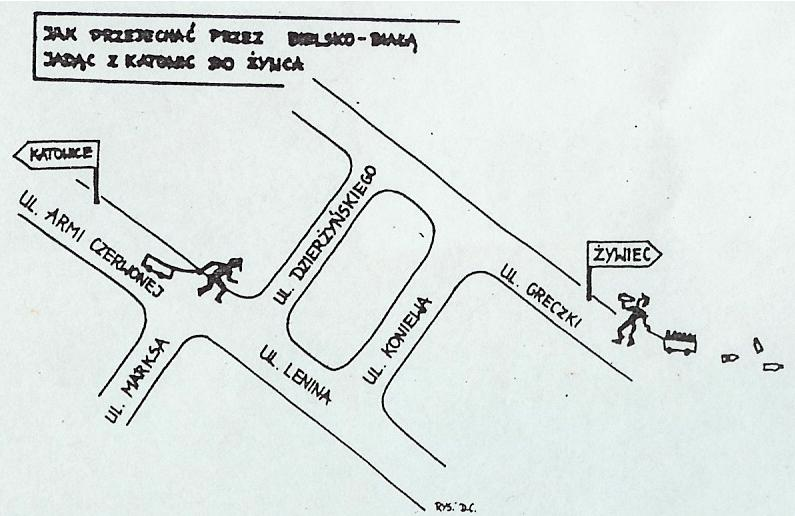 Rysunek satyryczny przedstawiający nazewnictwo głównych ulic Bielska-Białej przed przemianami 1989 roku (Armii Czerwonej - dziś Warszawska, Marksa - Sixta, Lenina - 3 Maja, Dzierżyńskiego - 11 Listopada, Koniewa - Stojałowskiego, Greczki - Żywiecka).